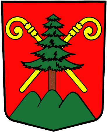 Wappen von Montana Kanton Wallis Schweiz